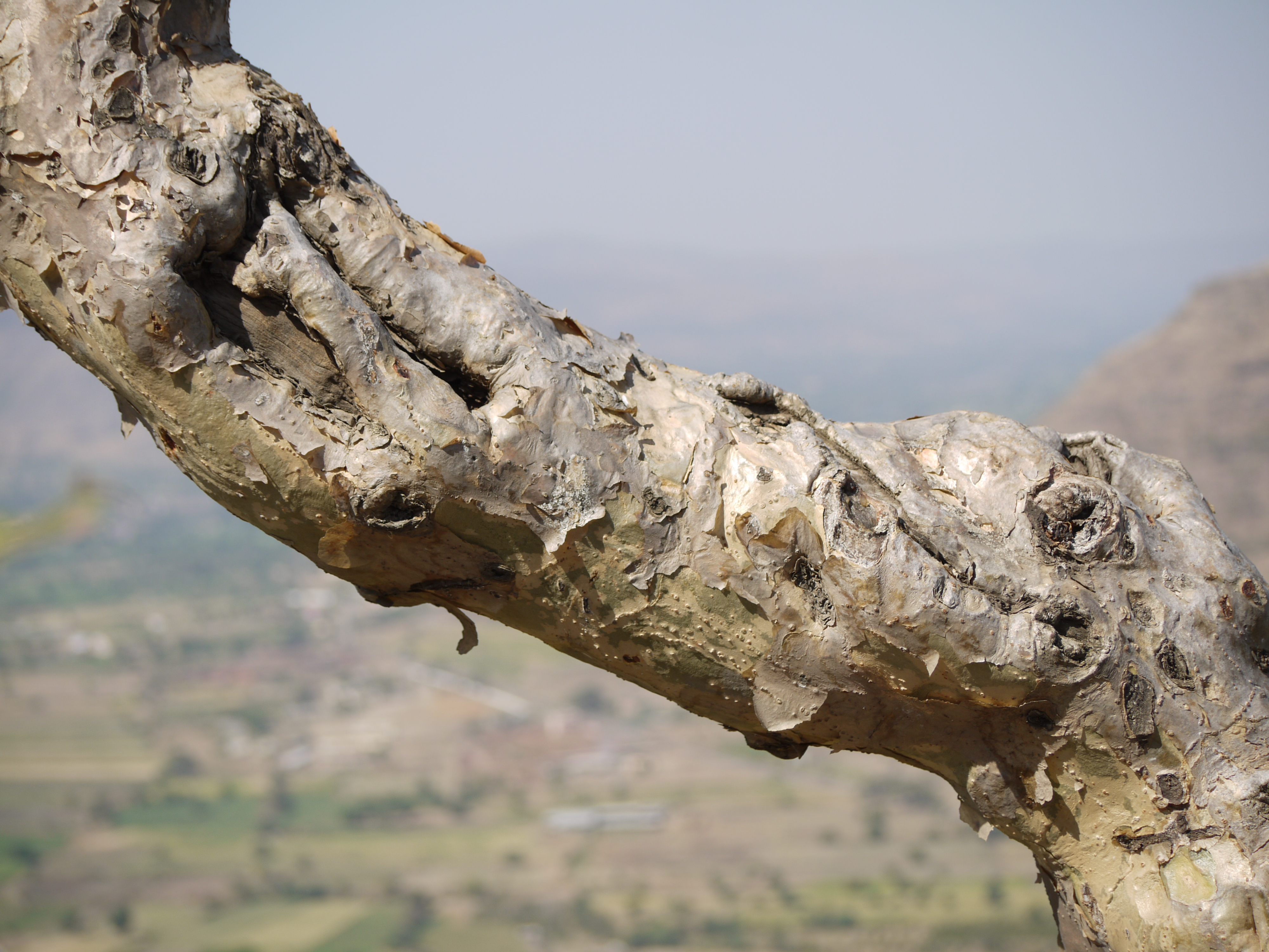 Burseraceae (incense or torchwood family) » Boswellia serrata bos-WELL-ee-a -- named for John Boswell, Scottish botanist and FRCP of Edinburgh sair-AY-tuh or ser-RAT-uh -- toothed like a saw commonly known as: Indian frankincense tree, Indian olibanum tree, salai tree • Gujarati: સાલેડી saaledi, સલાઈ ગૂગળ salaai gugul • Hindi: शल्लकी shallaki • Kannada: ಗುಗ್ಗುಳ ಮರ guggula mara • Malayalam: കുങ്ങില്യം kungilyam • Marathi: धुपाळी dhupali, धूपसाळी dhupasali, कुरुंद kurunda, सालफळी salaphali, साळई salai, साळी sali • Oriya: salai • Pali: सल्लकी sallaki • Punjabi: ਸਾਲ੍ਹੇ salhe, ਸਾਲਹੀ salhi • Sanskrit: भीषण bhishan, गुग्गुल guggula, हस्तिनशना hastinashana, पालंक palank, पार्वती parvati, ऱ्हादिनी hradini, कुरुन्द kurunda, सल्लकी sallaki, शल्लकी shallaki, स्रुवा sruva • Tamil: குமஞ்சம் kumancam, குங்கிலியம் kunkiliyam, மரத்துவெள்ளை marattu-vellai, பறங்கிச்சாம்பிராணி paranki-c-campi-rani, வெள்ளிக்கீரை vellai-k-kirai • Telugu: గుగ్గిలము guggilamu, పరంగిసాంబ్రాణిచెట్టు parangi-sambrani-chettu, సల్లకి sallaki ... the resin obtained from this tree is commonly known as: Indian olibanum, Indian frankincense, Konkani resin • Arabic: لبان luban • Hindi: कुंदर kundar, लोबान loban, मकन्द makand, मकुन्द makund • Kannada: ಚಿಲಕದೂಪ chilakadupa, ಧೂಪ dhupa, ಗುಗ್ಗುಳ guggula, ಹಾಲು ಮಡ್ಡಿ haalu maddi, ಲೋಬಾನ lobaana, ಪರಮ್ಗಿ ಸಾಮ್ಬ್ರಾಣಿ paramgi saambraani • Konkani: लोभान lobhan • Marathi: लोभान lobhan • Persian: گنده فيروزه gandha firoza, لوبان loban • Punjabi: ਲੋਬਾਣ loban • Sanskrit: द्विज dvija, कुन्दुर kundur, कुन्दुरु kunduru, मुकुन्दः mukundah, पालंकी palanki, पालंक्या palankya, सुरभी surabhi, तुरुष्क turushka • Telugu: కుందురువు kunduruvu • Urdu: لوبان loban Endemic to: India References: Flowers of India • NPGS / GRIN • DDSA